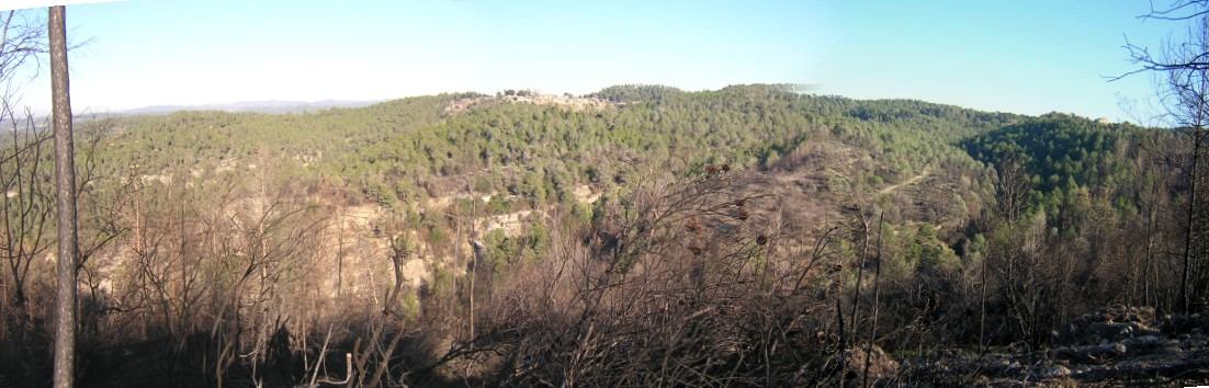 El Serrat del Feliu (Monistrol de Calders, Moianès)